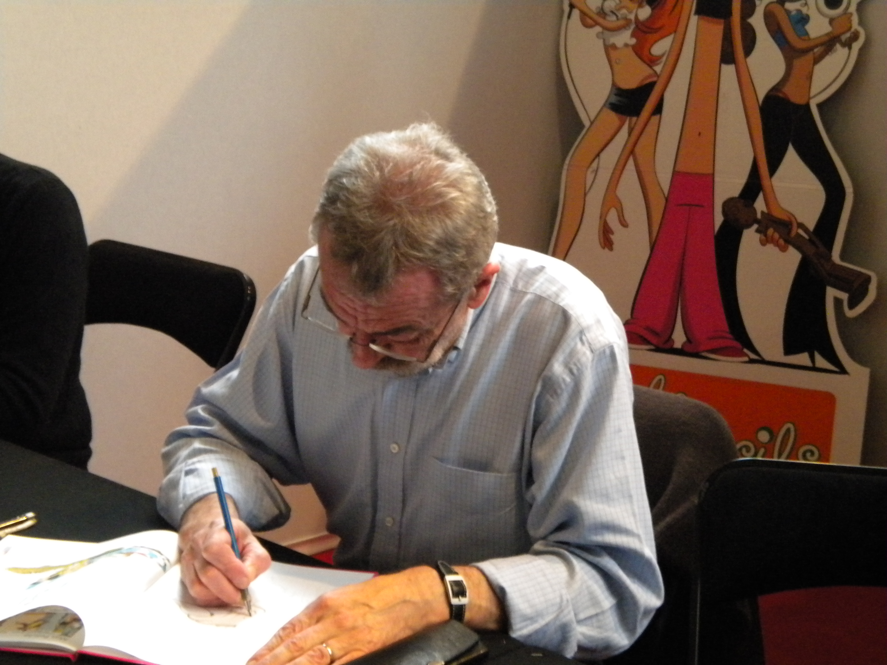 Photo du dessinateur de BD, Bédu.